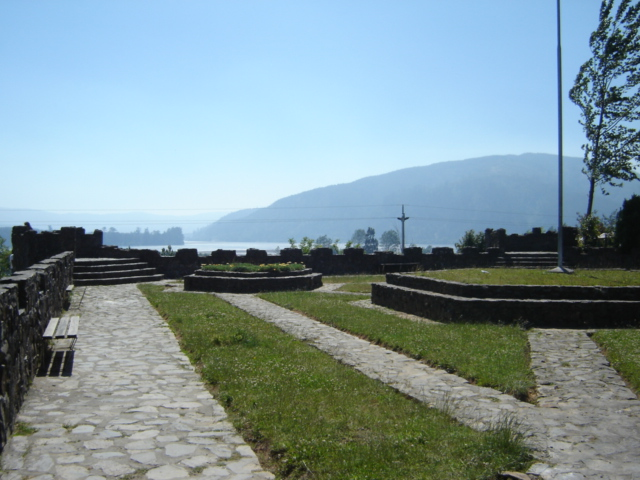 Mirador de Hualqui